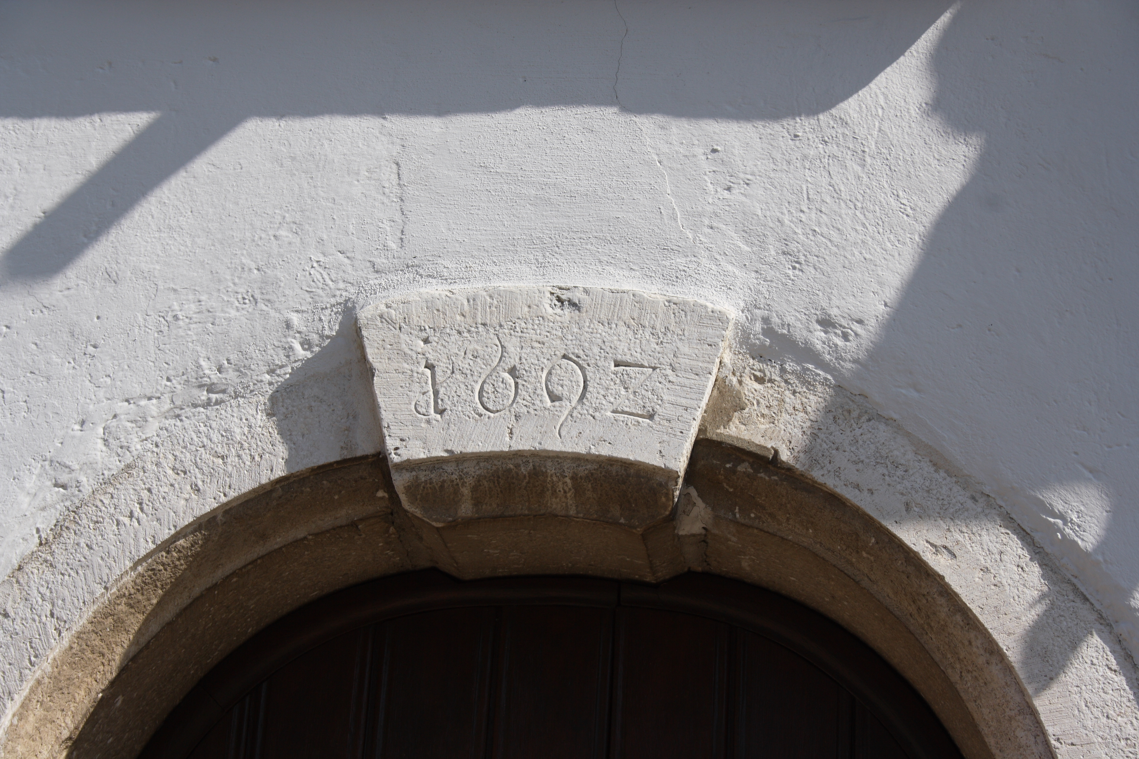 Katholische Pfarrkirche St. Nikolaus in Deisenhofen, einem Stadtteil von Höchstädt an der Donau im Landkreis Dillingen an der Donau (Bayern), Jahreszahl 1692 über dem Südportal